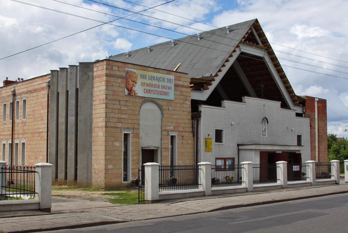 Zdjęcie kościoła Niepokalanego Poczęcia NMP na bydgoskich Jachcicach, Zdjęcie z lipca 2012